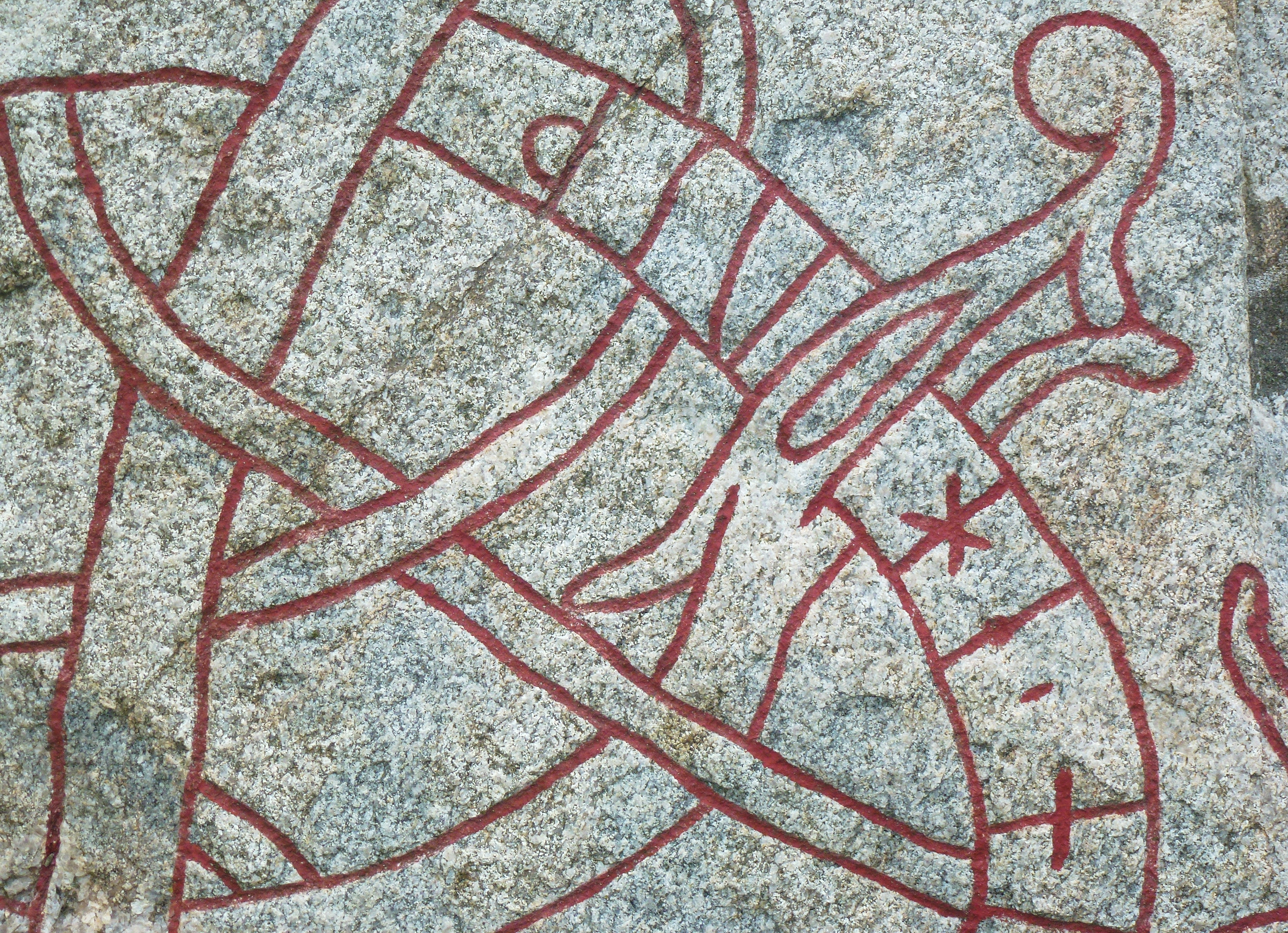 Kistastenen U75 vid Kista gård